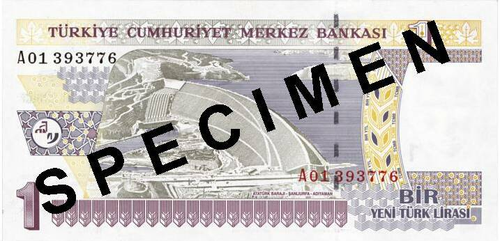 1 YTL arka